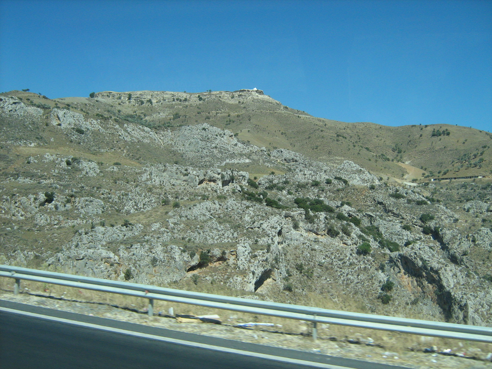 Patéla di Priniàs, vista dall'autostrada